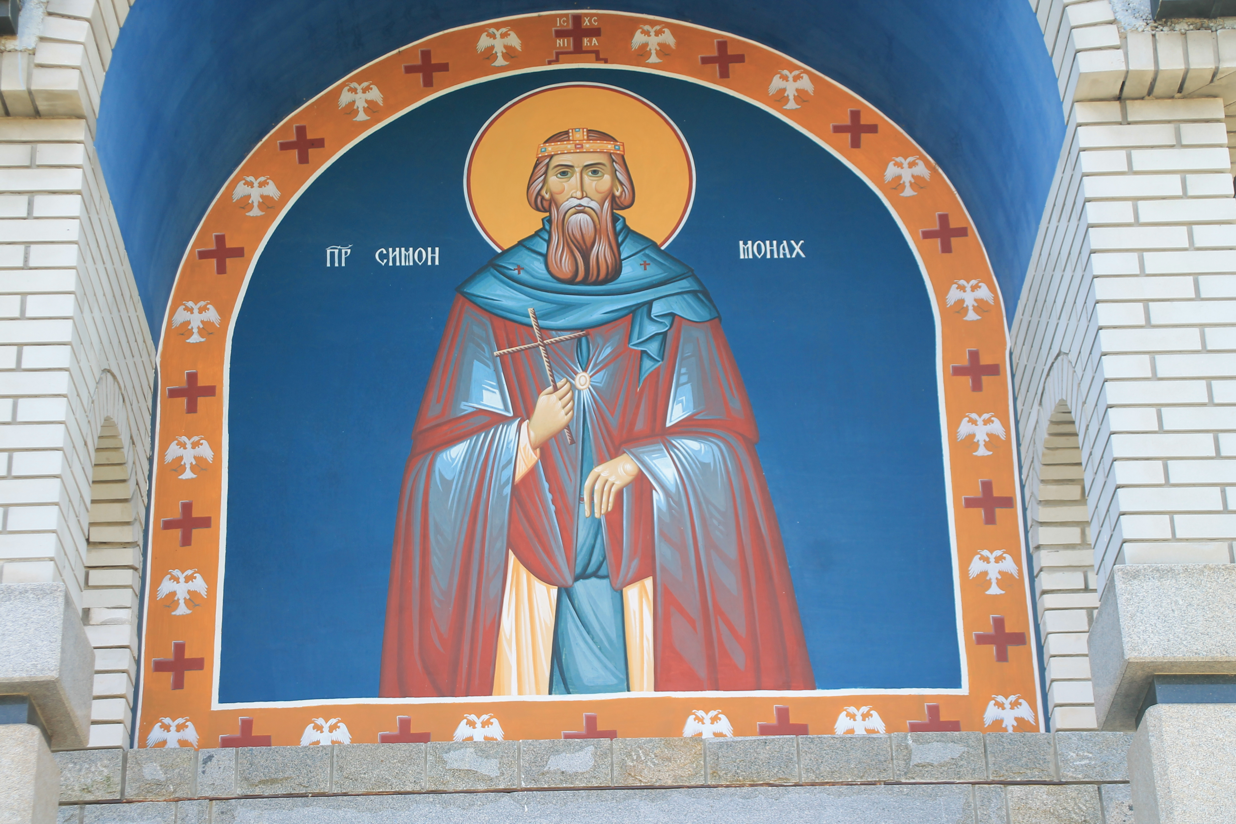 Crkva Sv. Simeona Monaha (Darosava)